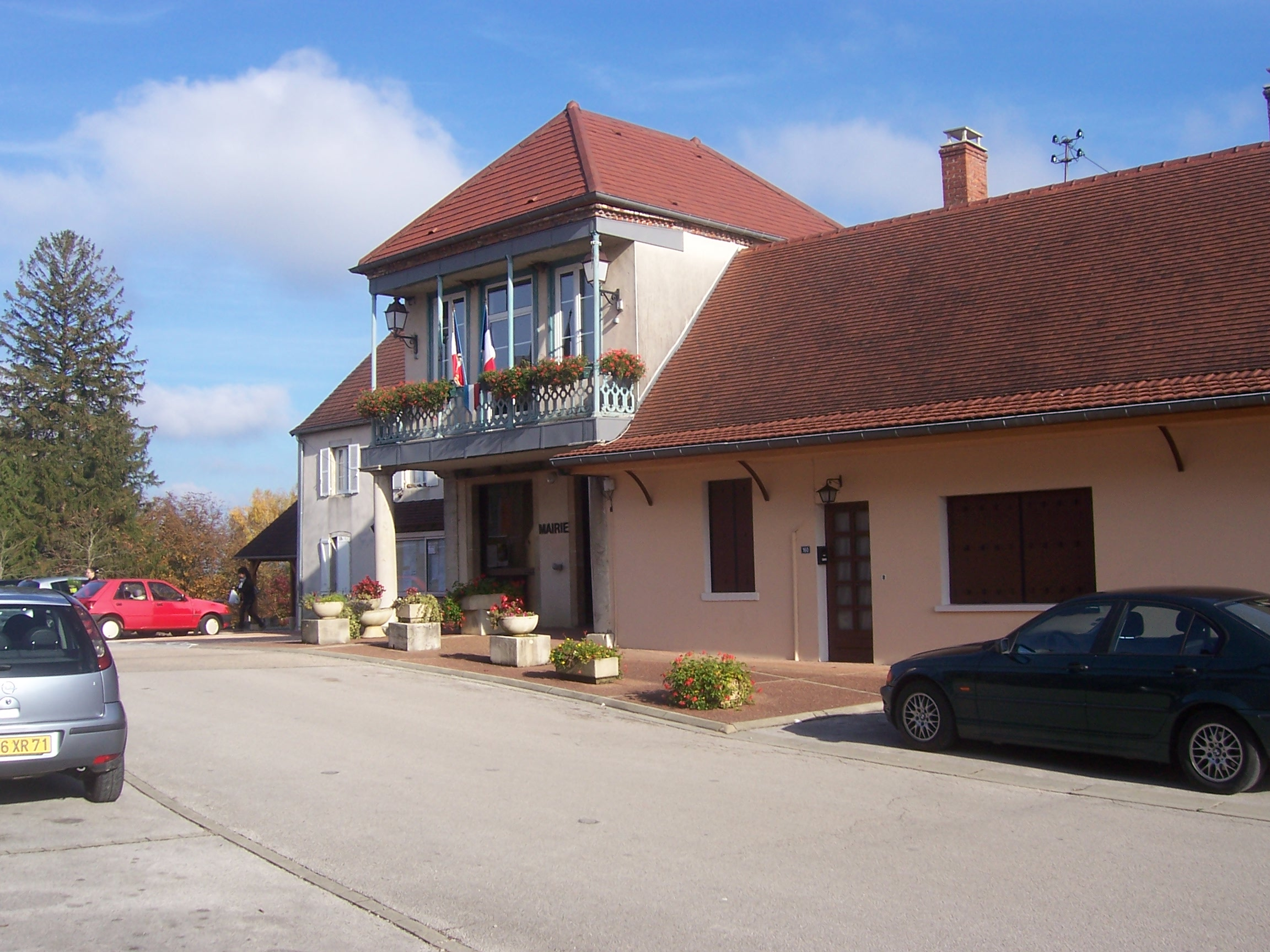 Mairie de Savigny-en-Revermont